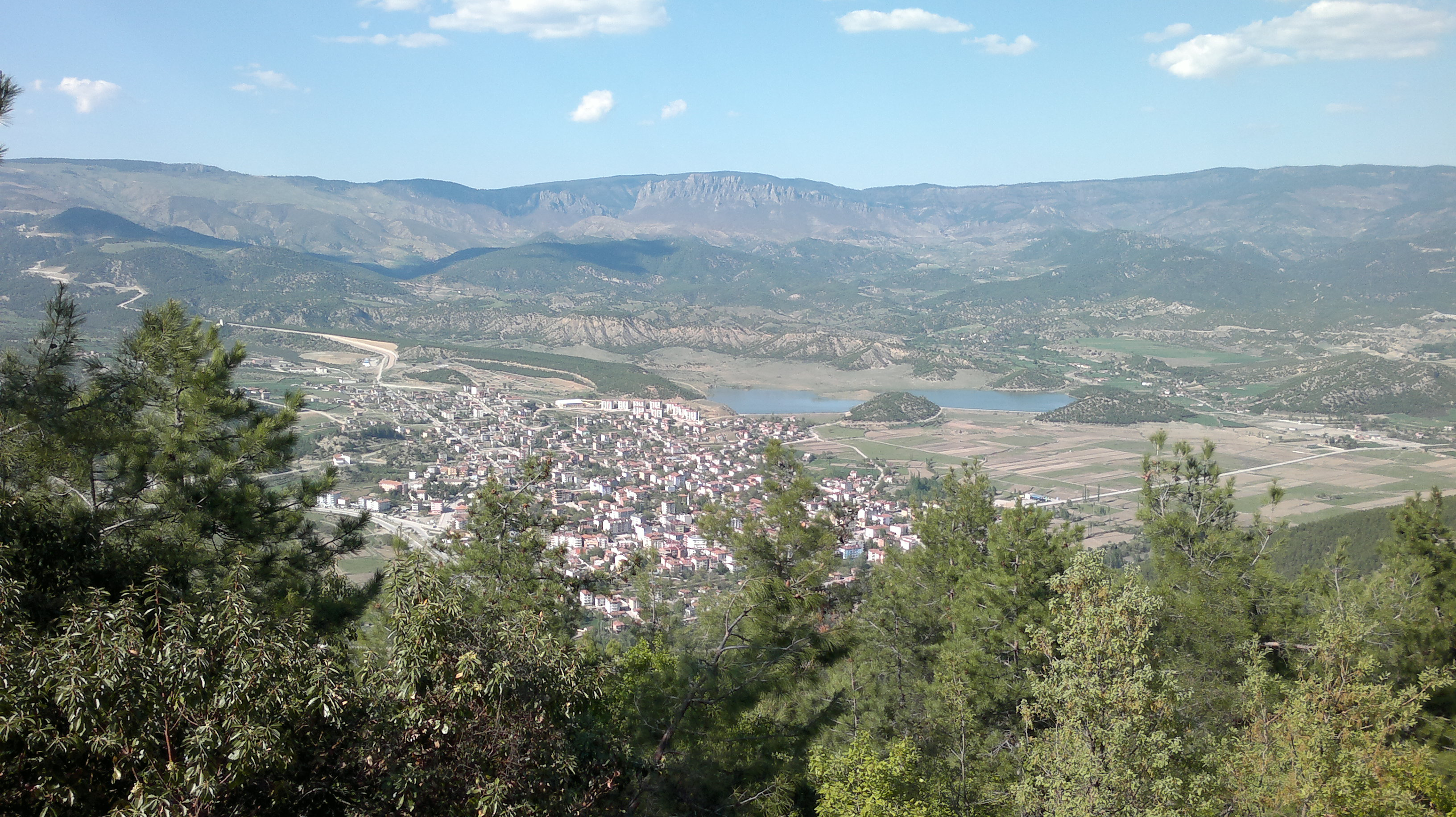 ben çektim